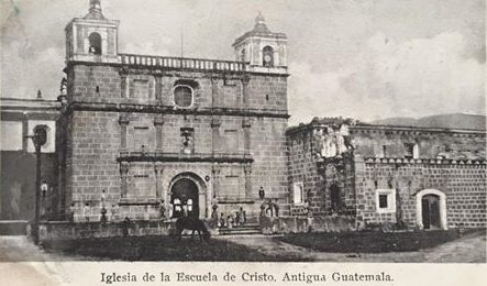 Iglesia de la Escuela de Cristo a finales del siglo xix.